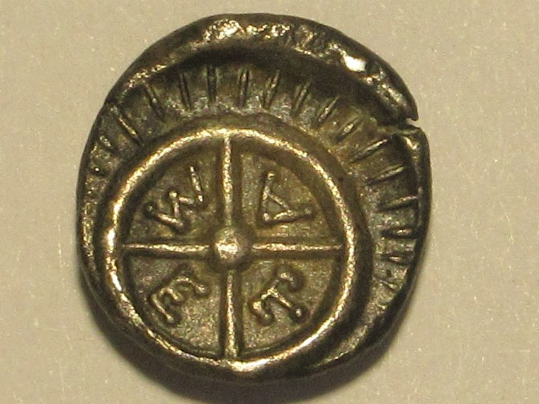 Rückseite der Münze, abgekürzter Stadtname in Rad